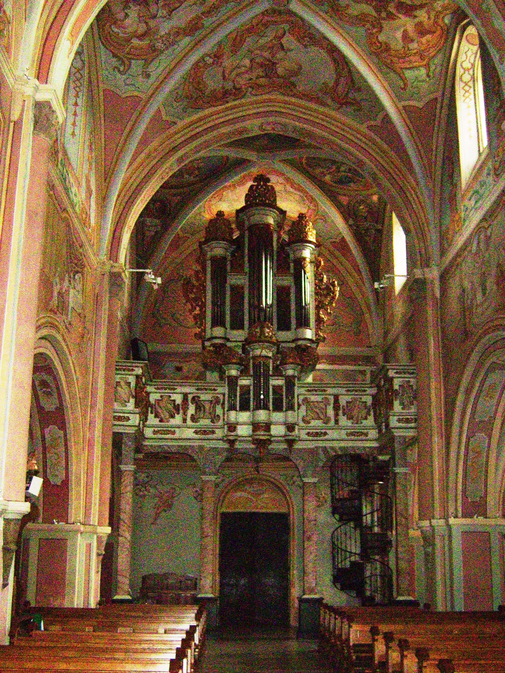 Opactwo.